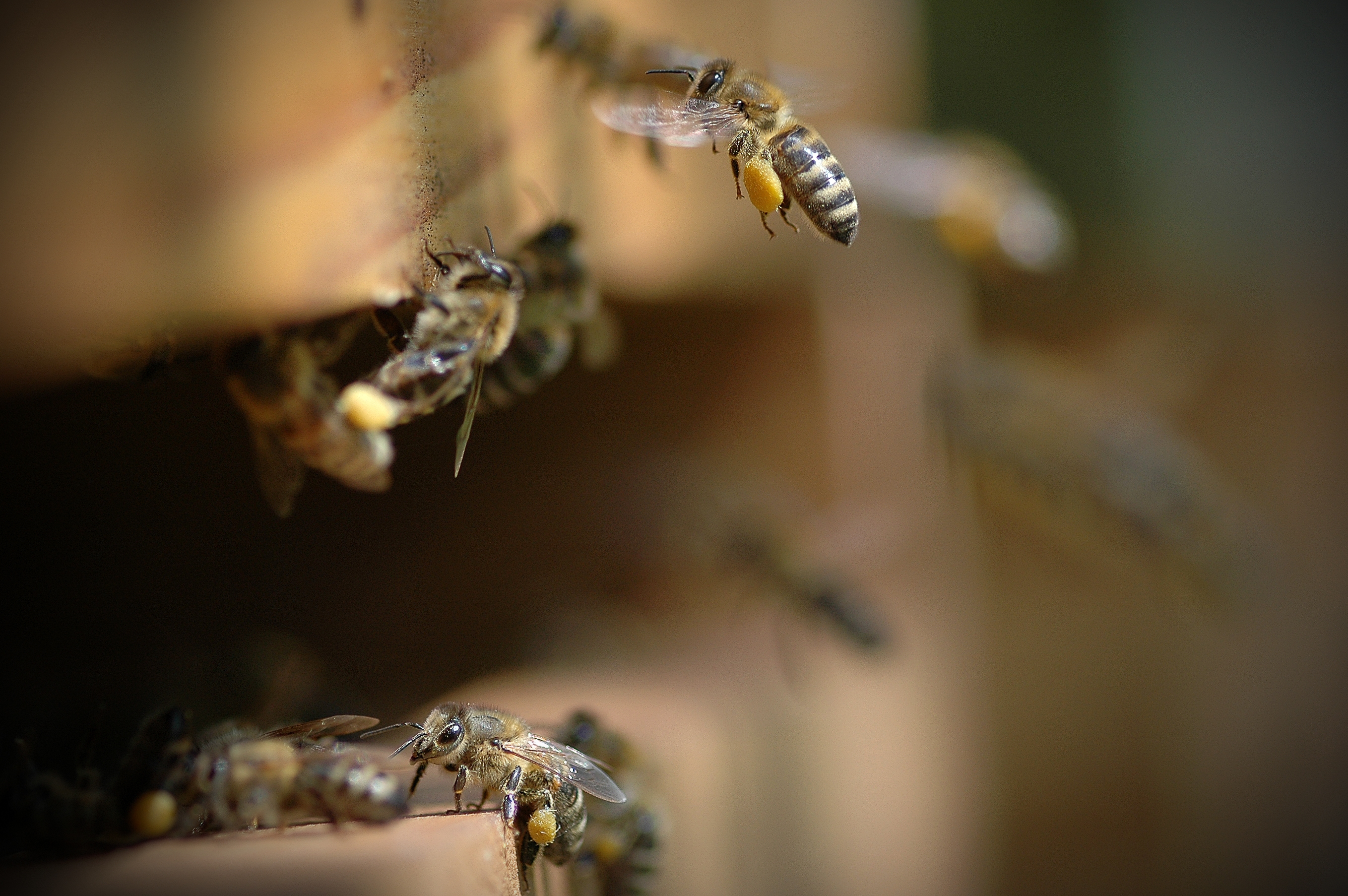 Honey Bee near Prijedor, BiH